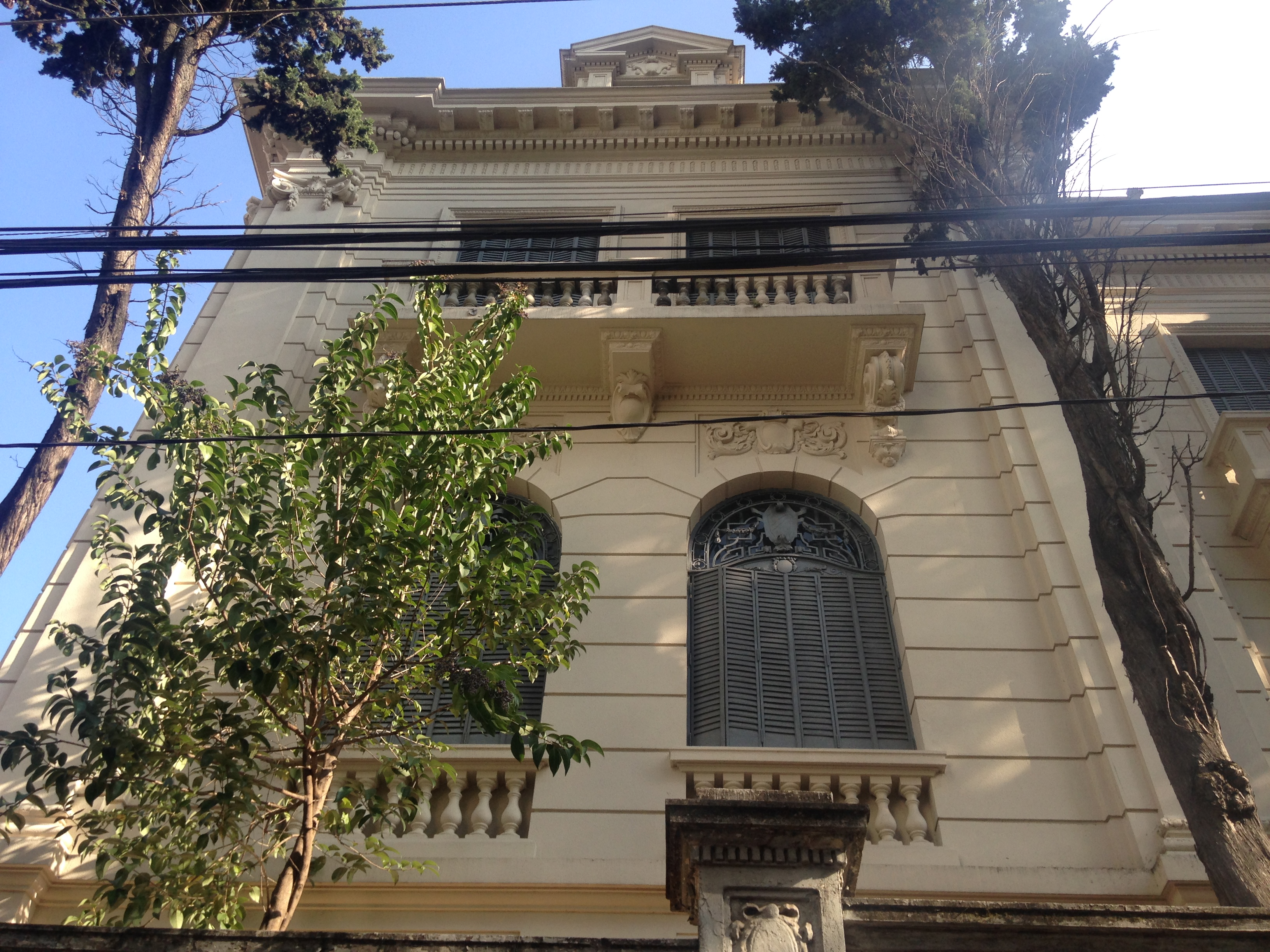 Detalhe da arquitetura da Residência da Família Jafet, na Rua Bom Pastor, 825, em São Paulo (SP), Brasil.